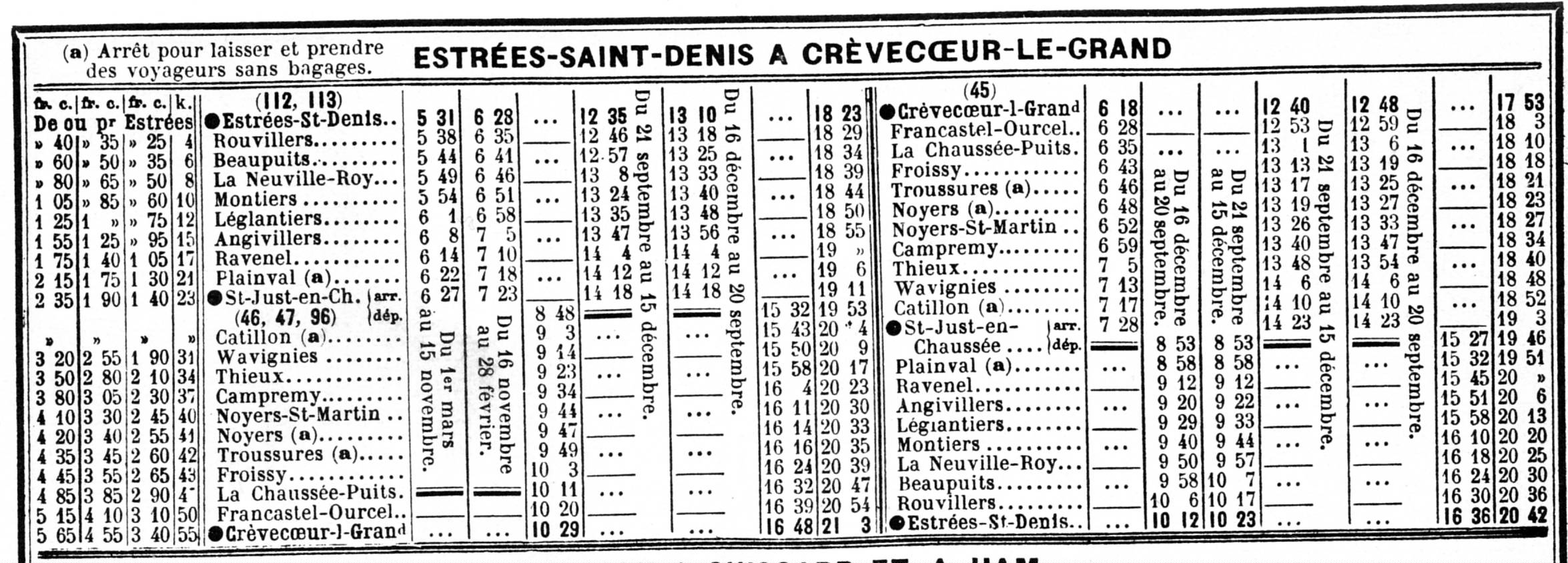 Tableau horaire de la ligne Estrées-Saint-Denis - Froissy - Crèvecœur-le-Grand Compagnie Estrées-Saint-Denis - Froissy - Crèvecœur-le-Grand le Grand (EFC) puis CGL